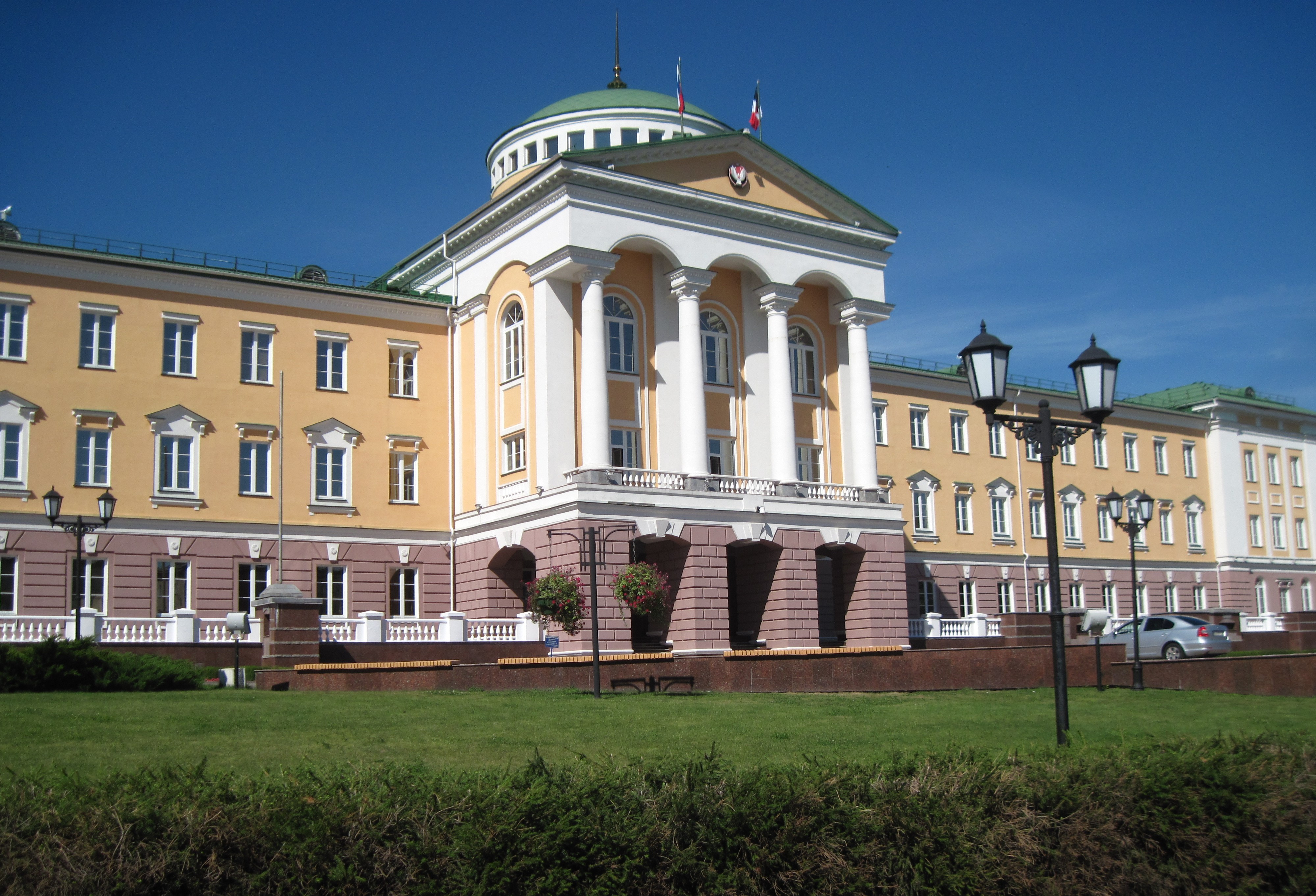 Город Ижевск,ул.Лихвинцева,25